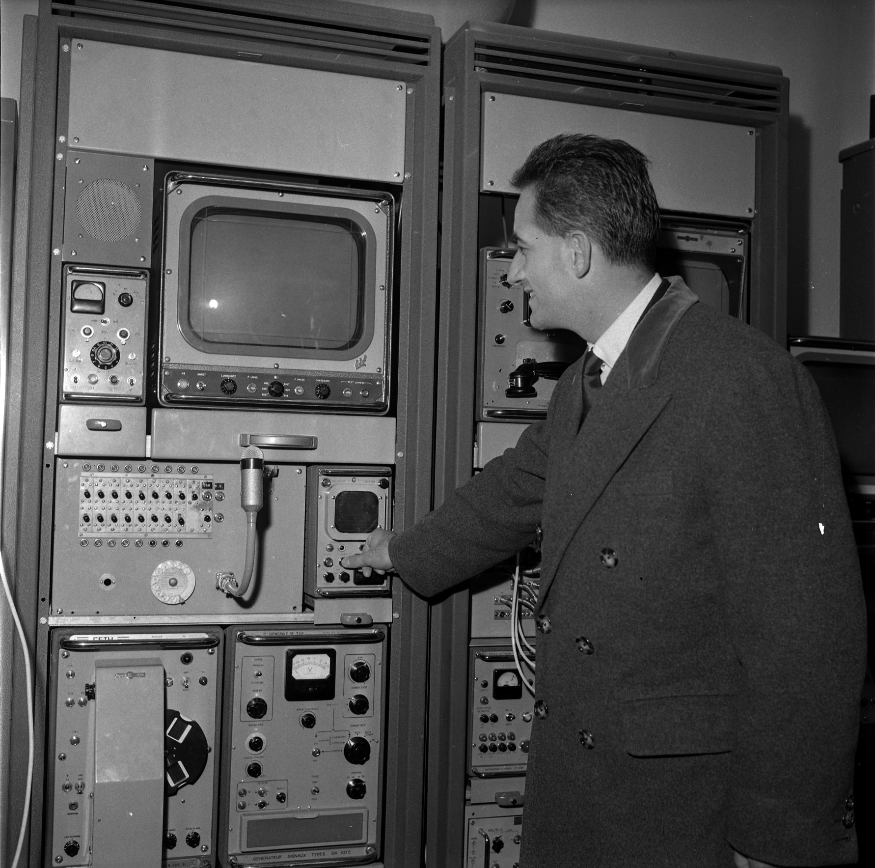 Pas de lieu. Le 6 Décembre 1963. Vue d'Alain Peyrefitte, ministre de l'Information, qui inaugure la télévision.